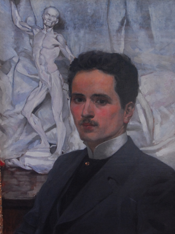 "Autoritratto giovanile", olio, coll. privata